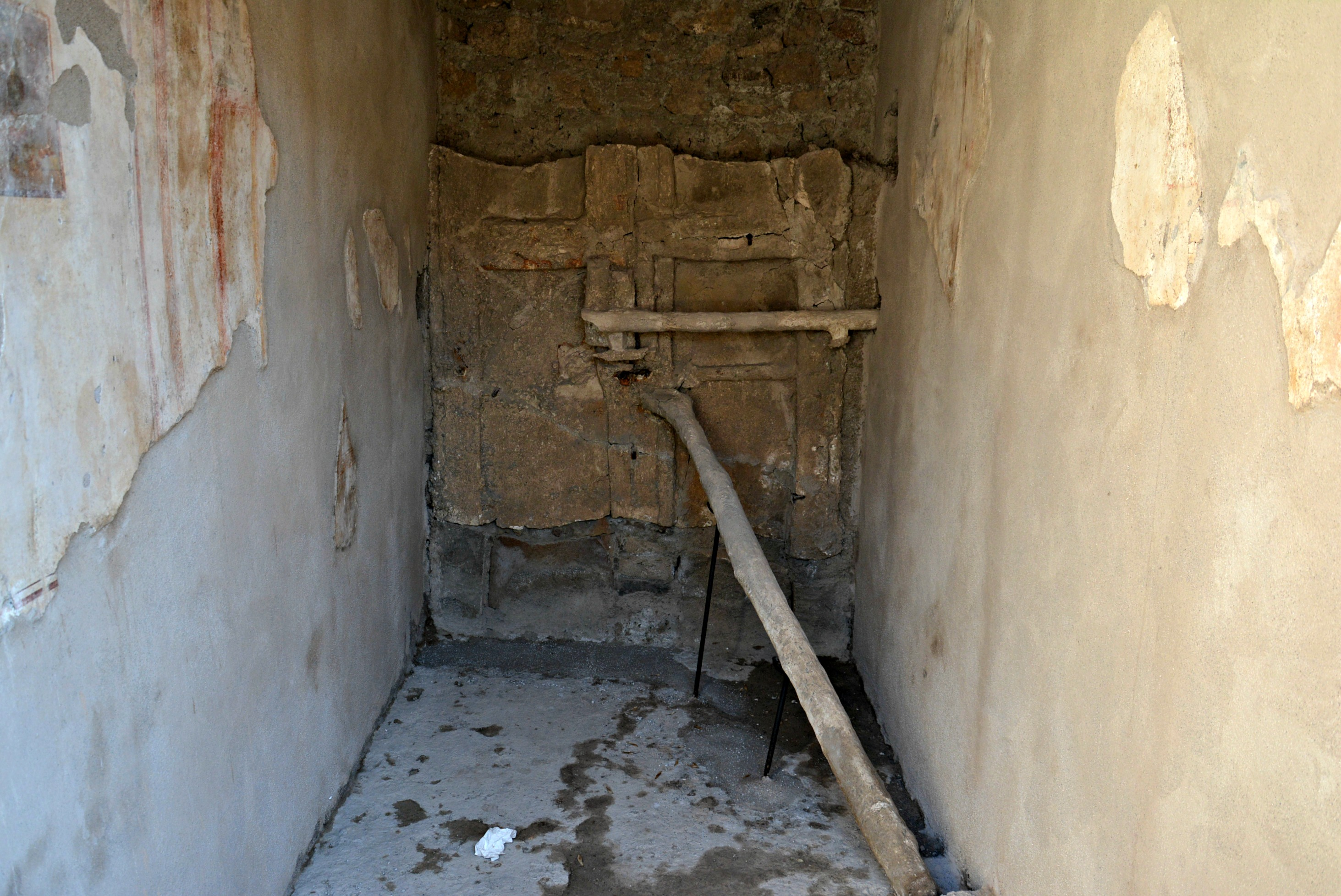 Vedi titolo